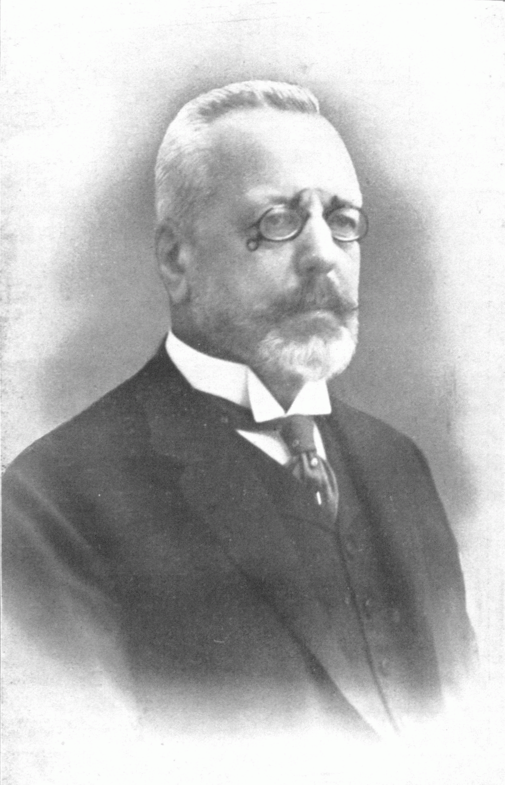 István Burián (Stephan Burián von Rajecz; 1852-1922), Hungarian politician